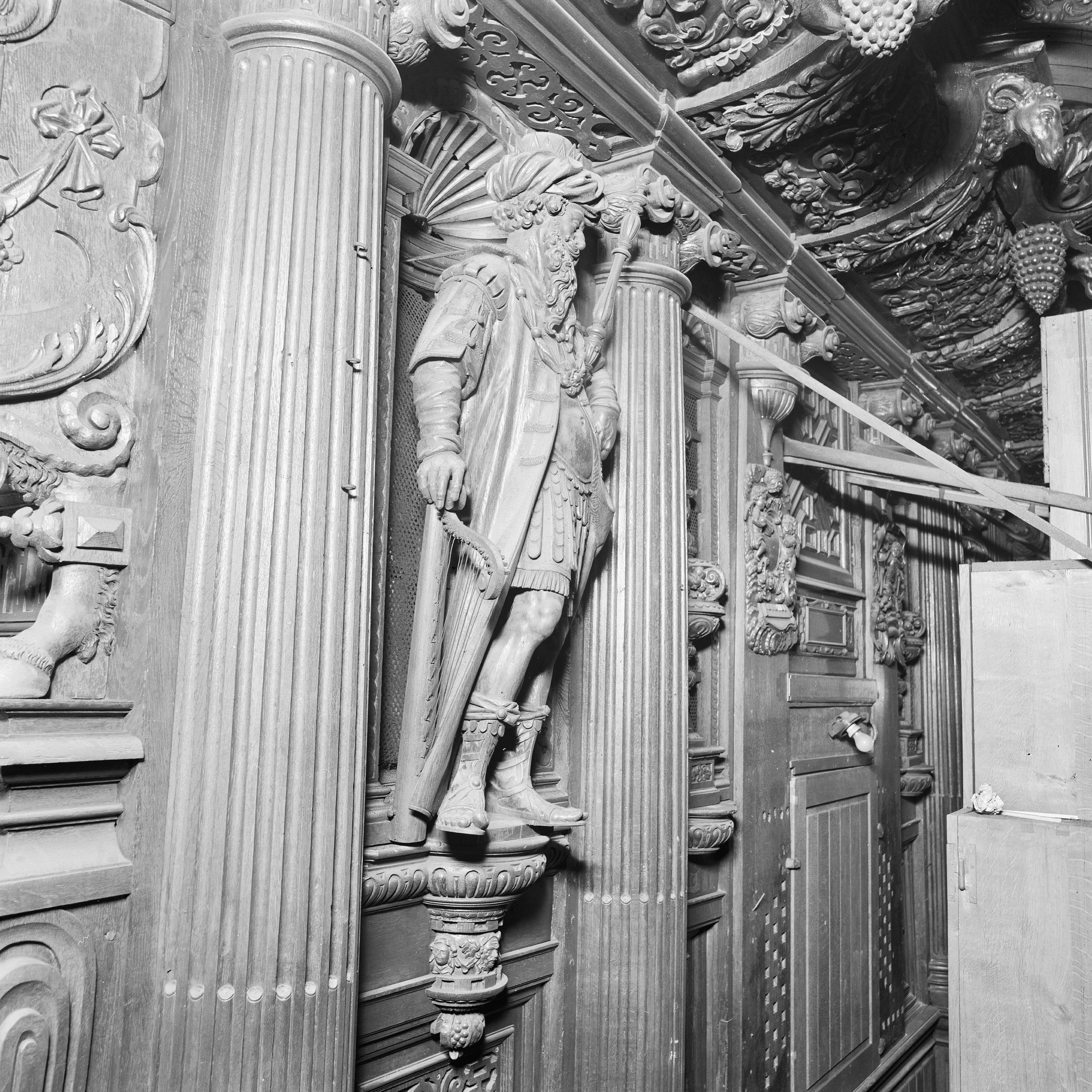 Sint Janskathedraal: INT. ORGEL, ONDERBOUW VAN BORSTPOSITIEF, MET BEELD VAN KONING DAVID